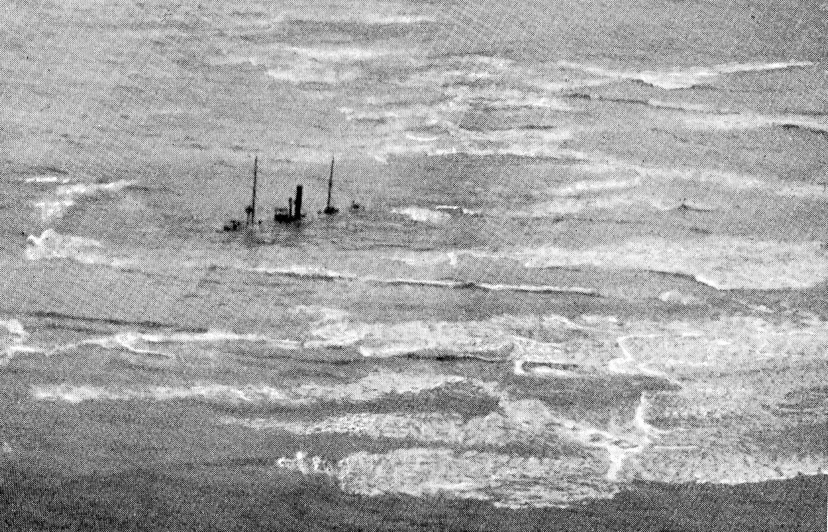 Auf Borkumriff 1918 gestrandetes Vorpostenboot. Entweder handelt es sich um das Wrack der "Lister Tief" oder der "Bürgermeister Pauli"